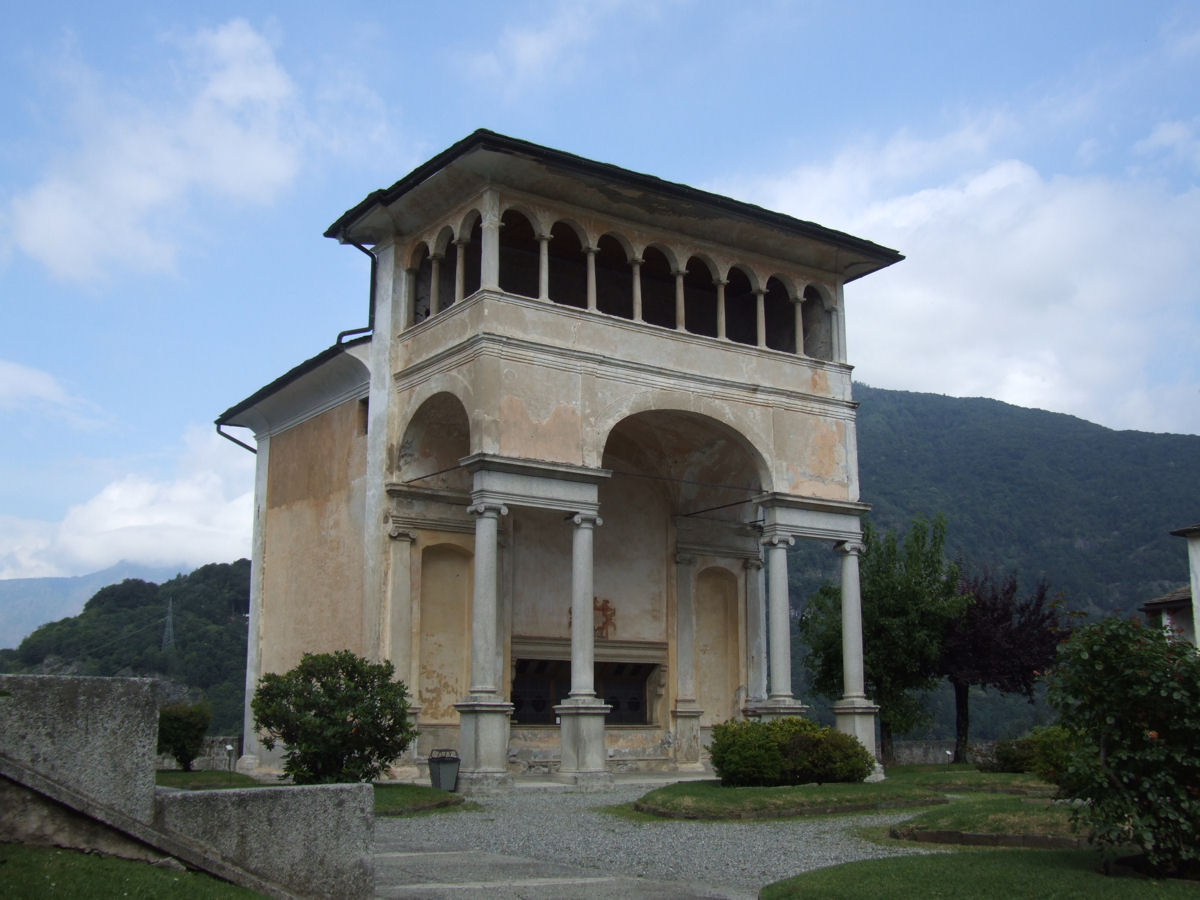 Sacro Monte di Varallo, Varallo Sesia, Italy, Chapel XXVI (1630-35)